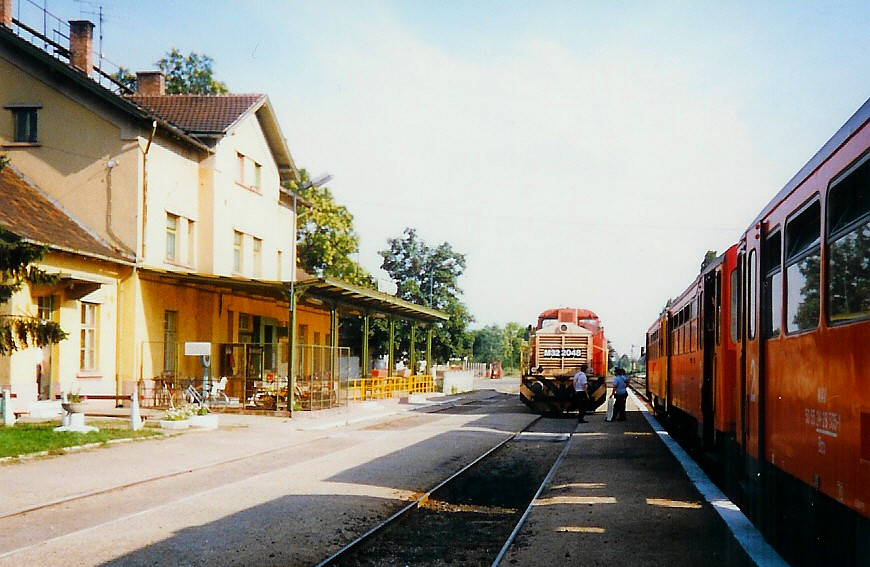 A MÁV M32 sorozatú mozdonya által vontatott vonat a csongrádi vasútállomáson. A kép jobb oldalán egy Bz szerelvény látható.